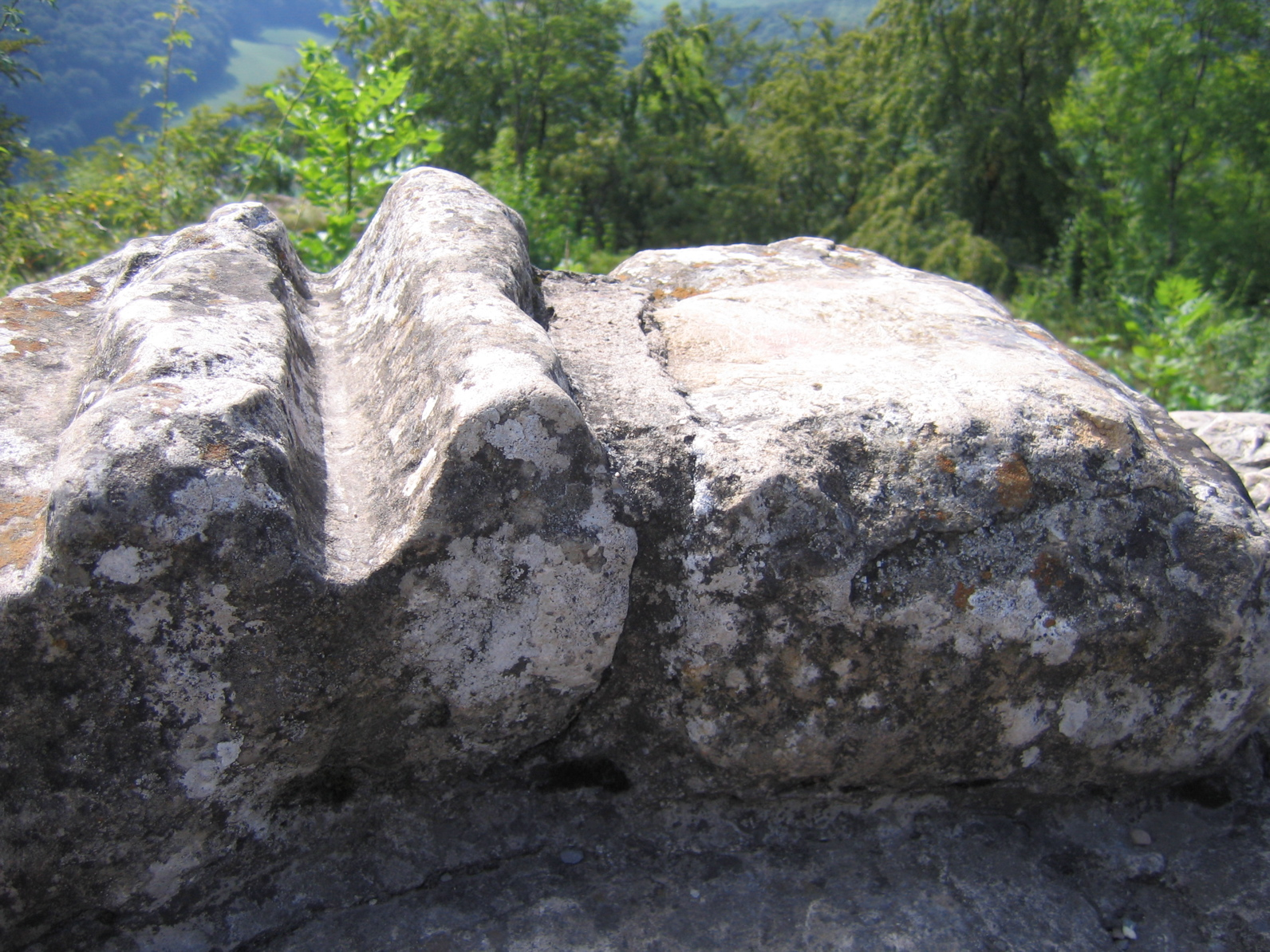 Spurstein, vermutlich der Römerstrasse in einer Mauer der Küssaburg, Landkreis Waldshut, Küssaberg (Gemeinde), Baden-Württemberg.